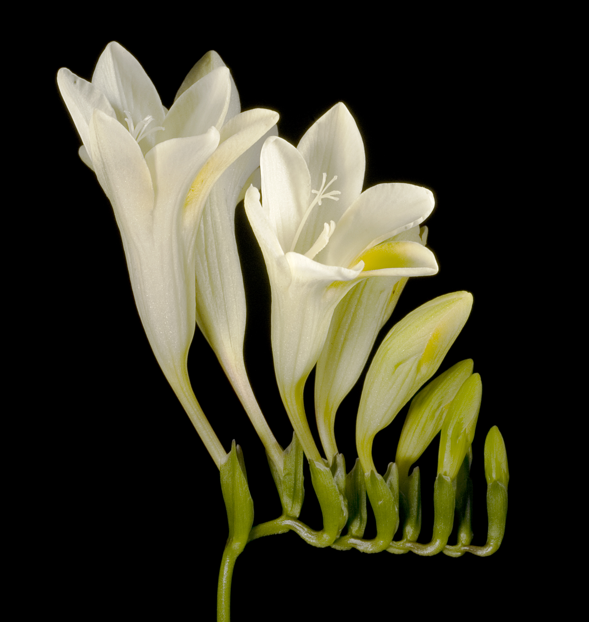 KRT3325